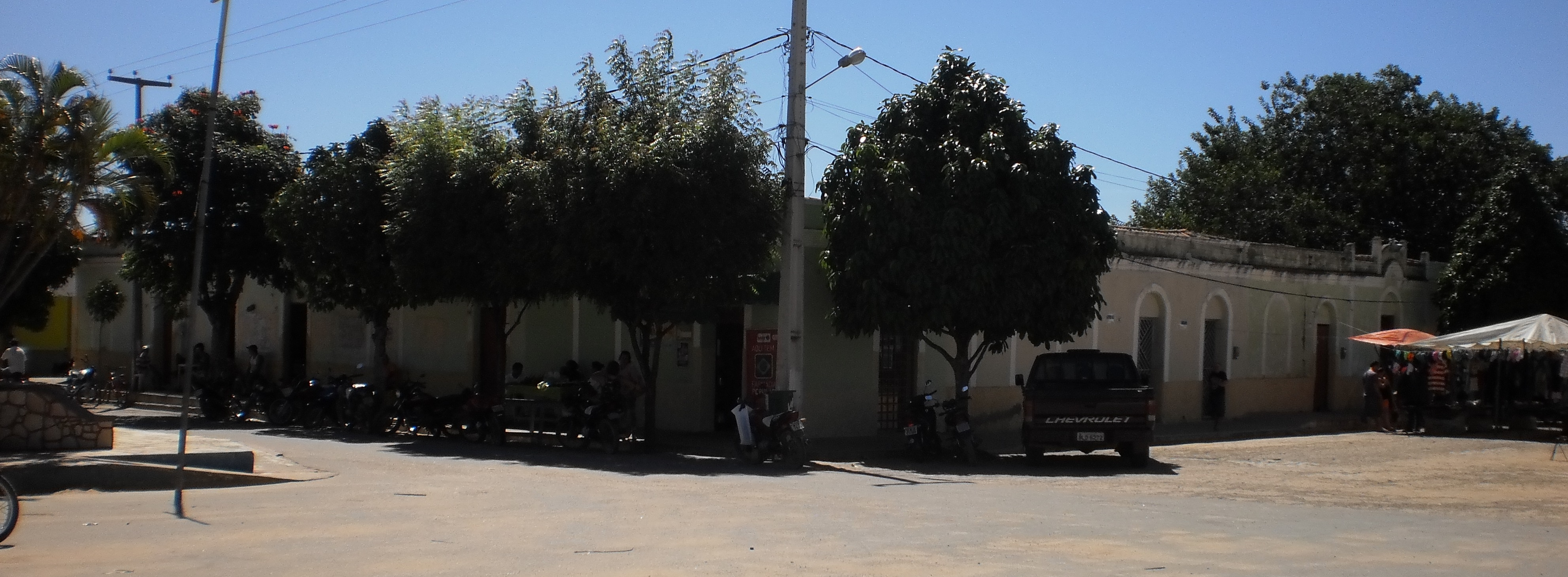 Mercado Público de Portalegre, Rio Grande do Norte, Brasil.